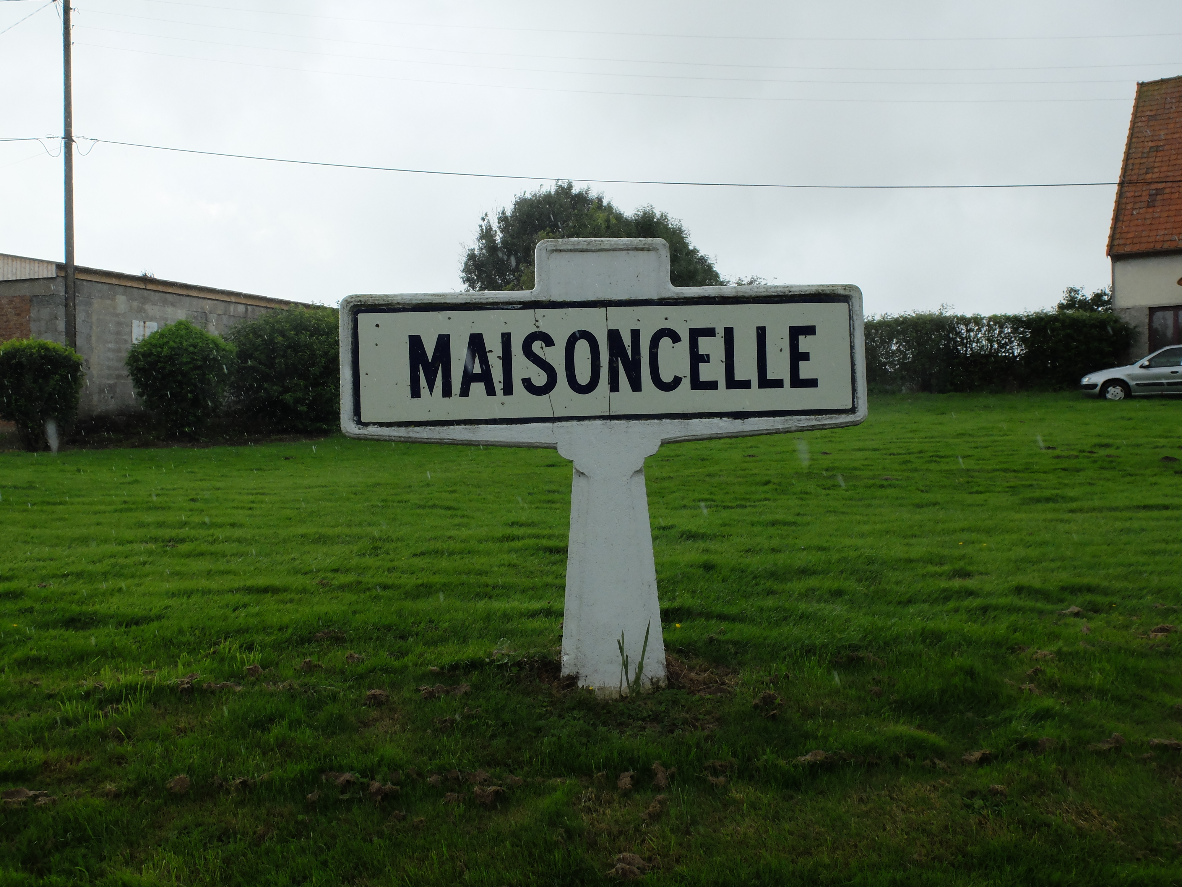 Vue d'un ancien panneau d'entrée de Maisoncelle, figurant désormais sur la place de la commune.